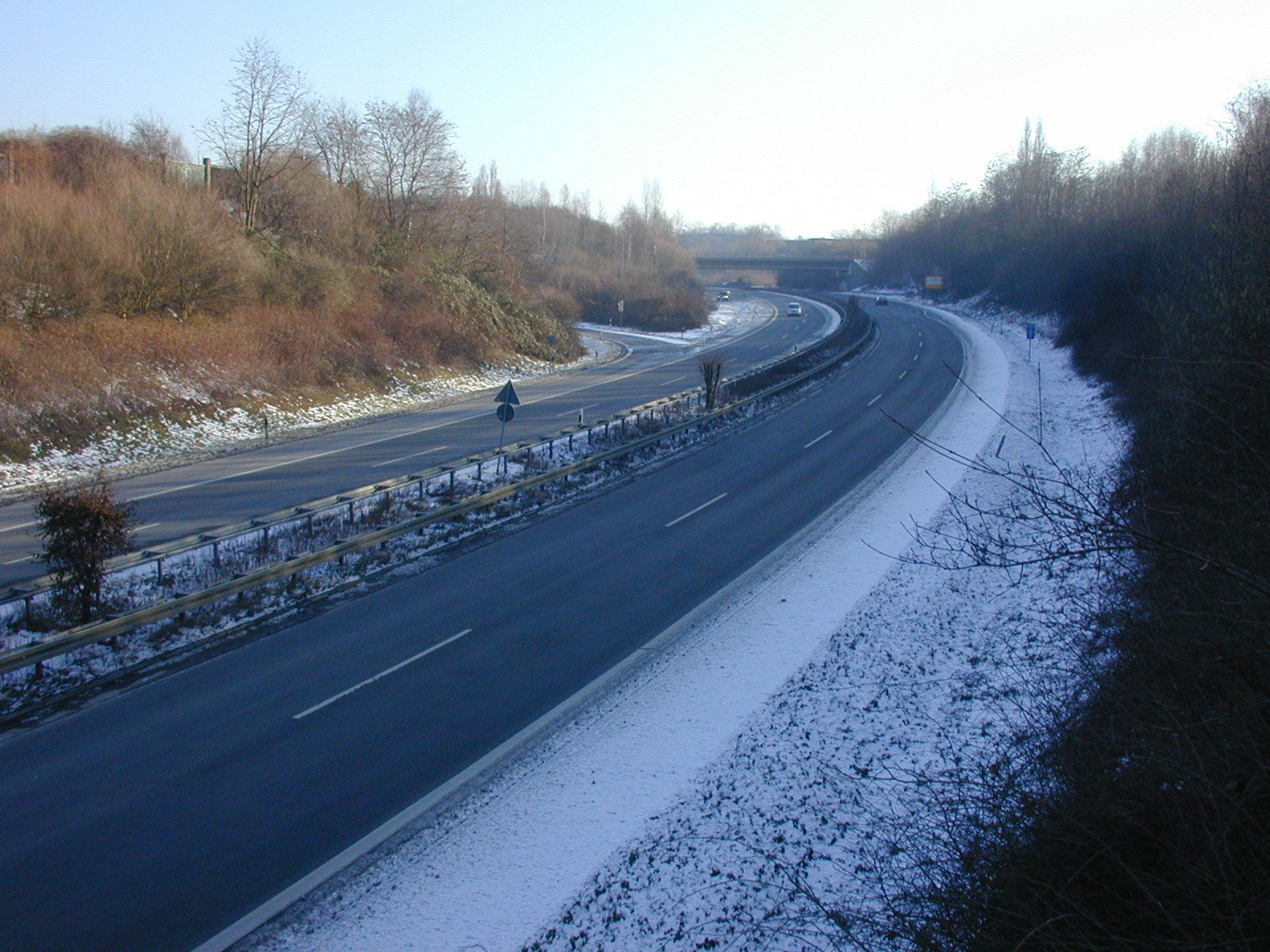 Bochumer Ring im Bereich des Heusnerviertels